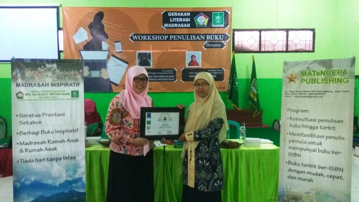 Ketua Umum Perkumpulan Guru Madrasah Penulis atau Pergumapi, Siska Yuniati, dan Ketua Bidang Penerbitan Pergumapi, Dr. Najmah, dalam acara Gerakan Literasi Madrasah di MTs Nahdlatul Ulama Pakis, Kabupaten Malang, Jawa Timur, Indonesia.